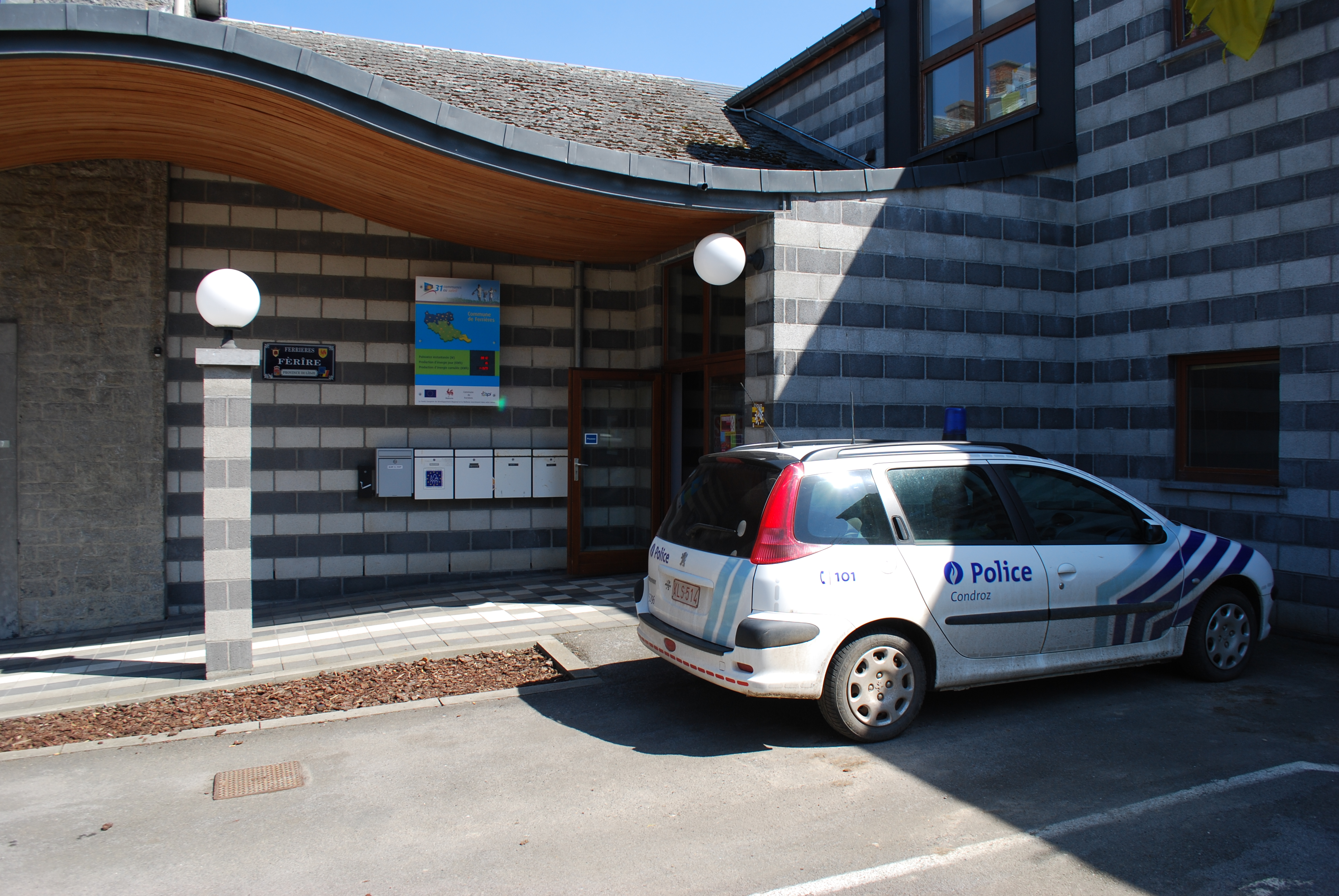 Vue de Ferrières.